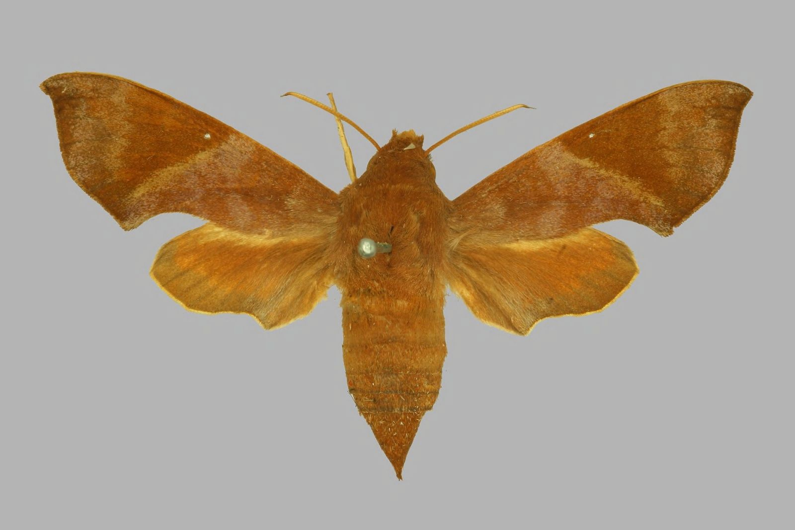 Temnora marginata marginata, female, upperside. South Africa, Natal, Durban